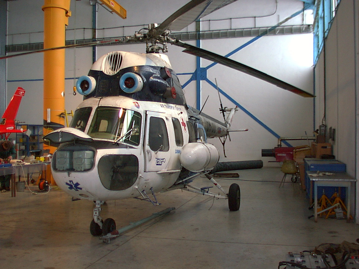 Mil Mi-2 v hangári na letisku v Poprade